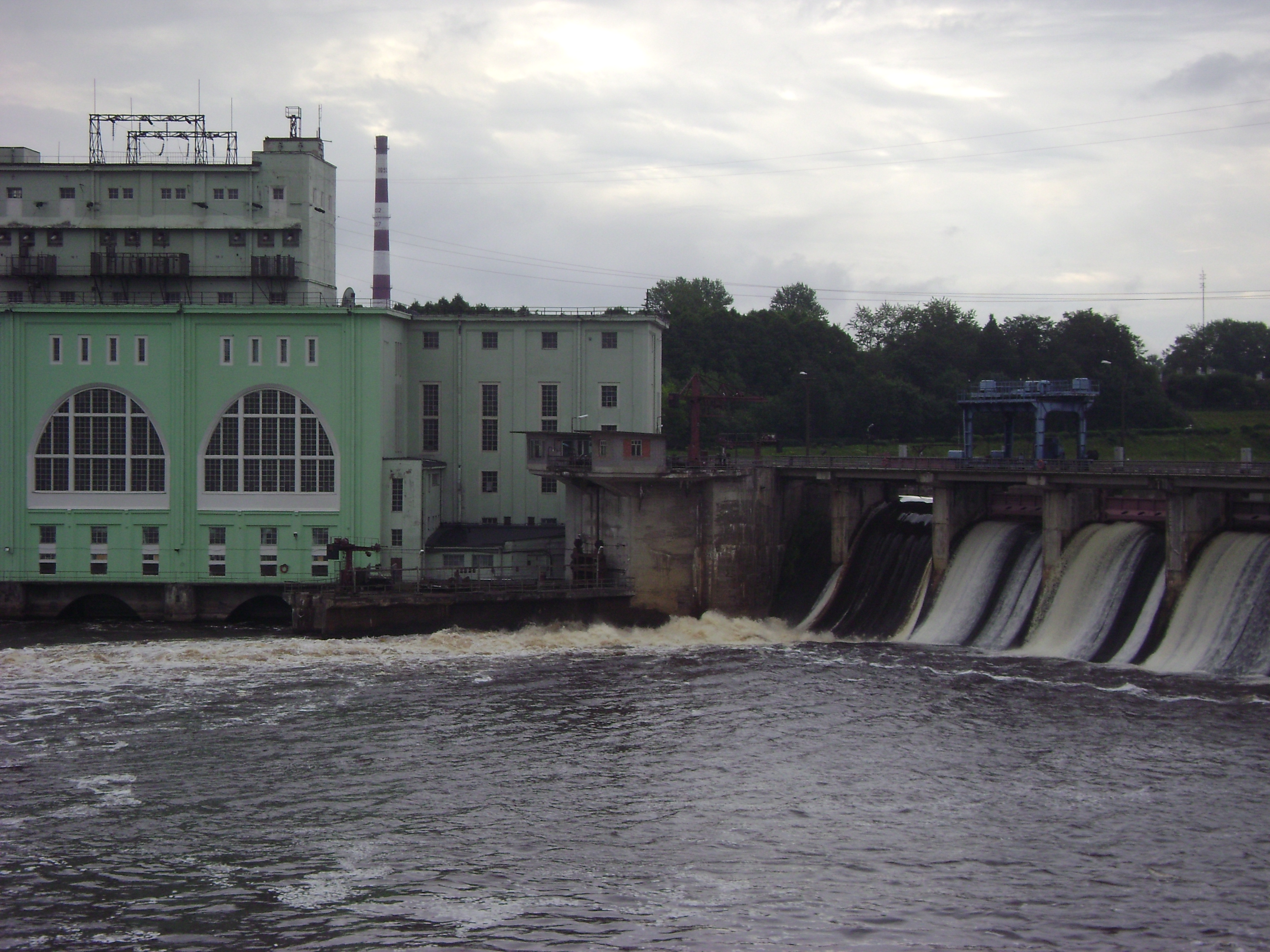 Плотина Волховской ГЭС